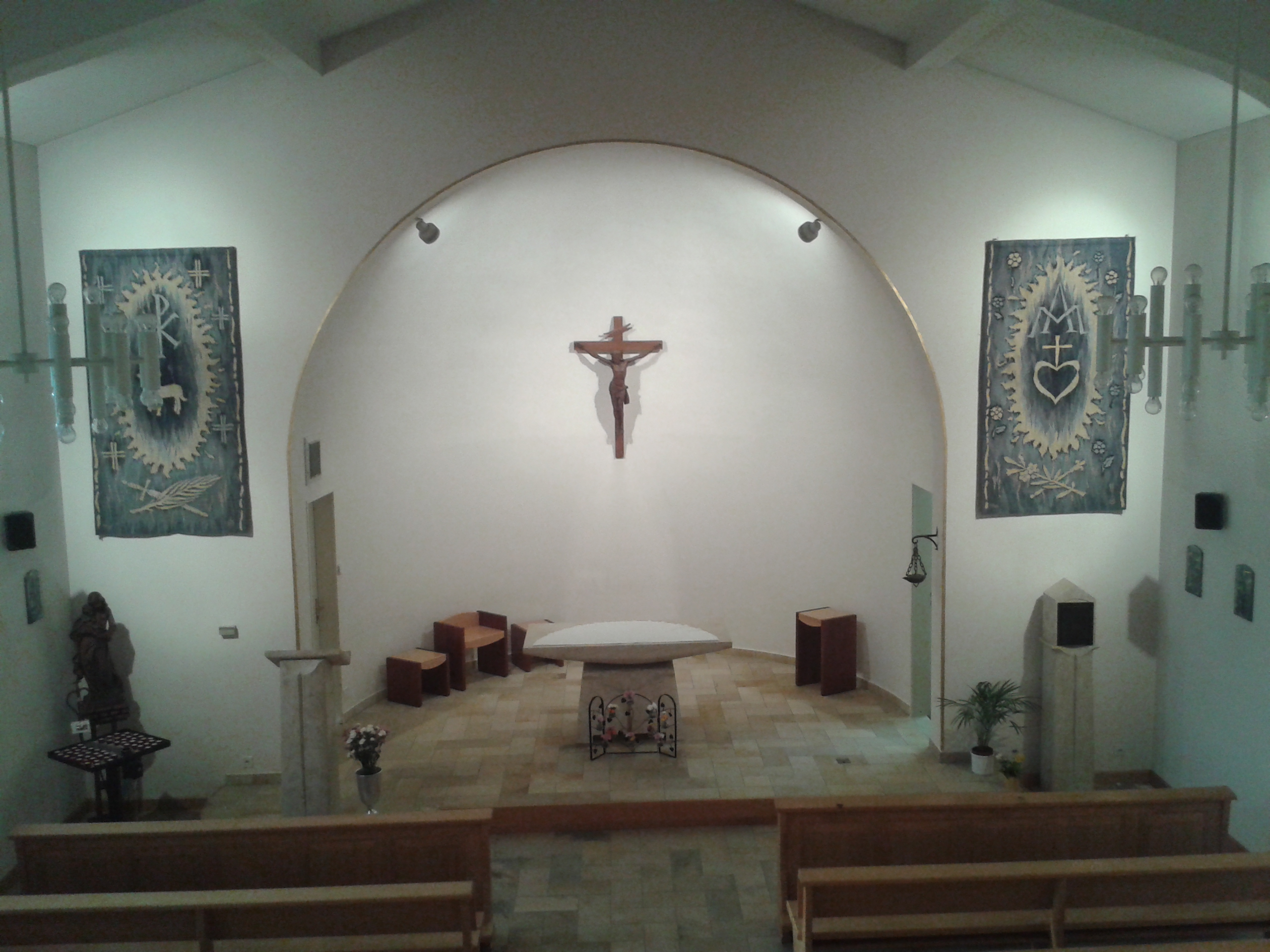 Au centre le choeur (crucifix, autel, ambon et mobilier liturgique) et sur les côtés : tapisseries, tabernacle, Vierge à l'Enfant et lumignons.